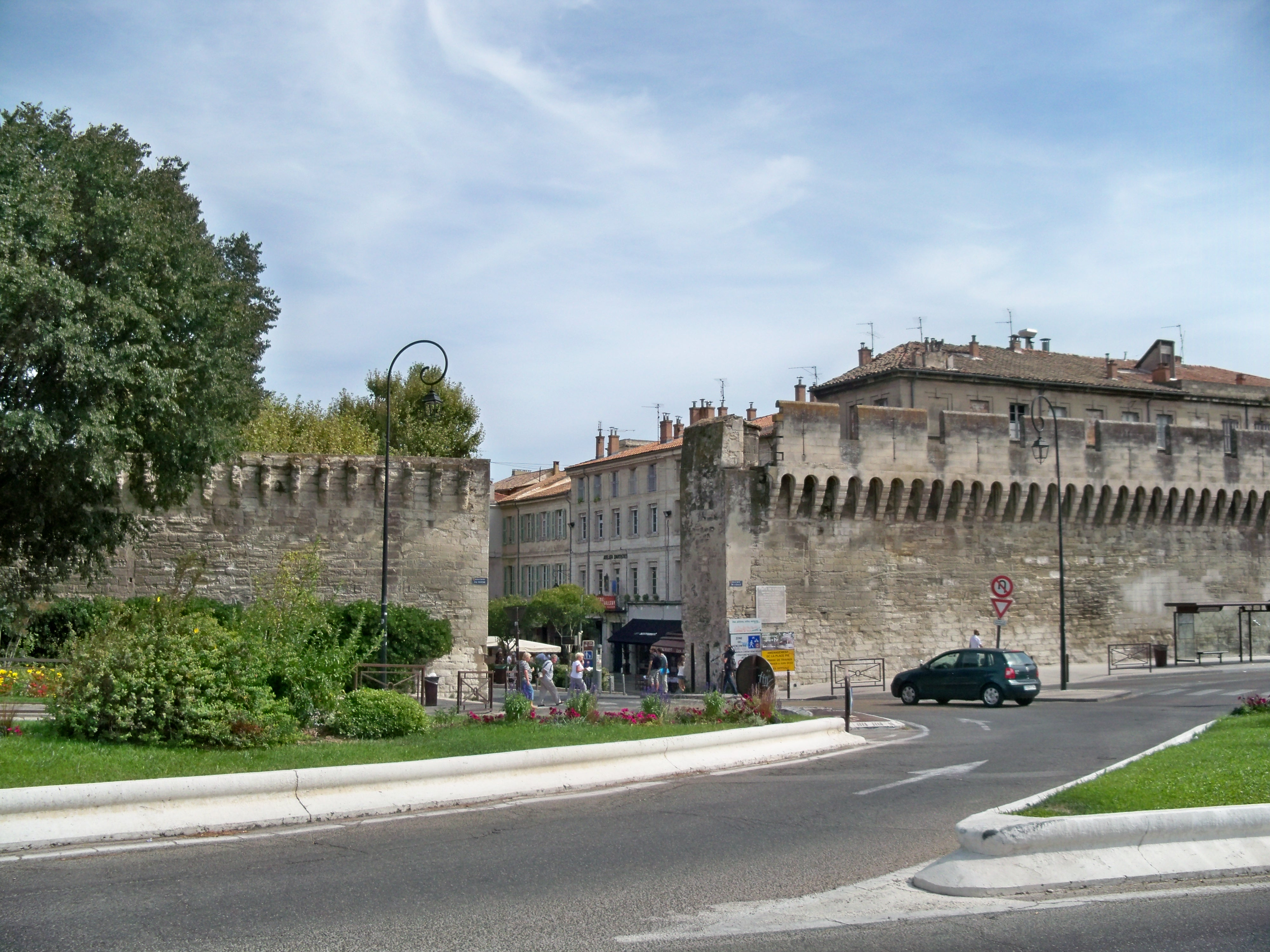 Porte de l'Oulle, à Avignon, Vaucluse, France